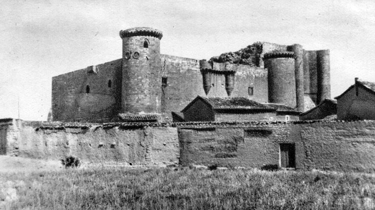 Castillo - Fuentes de Valdepero (Palencia) - España Turística y Monumental / Cuarto álbum / Las Bellezas de Castilla / Región Leonesa - Cromo 90 x 70 Sepia